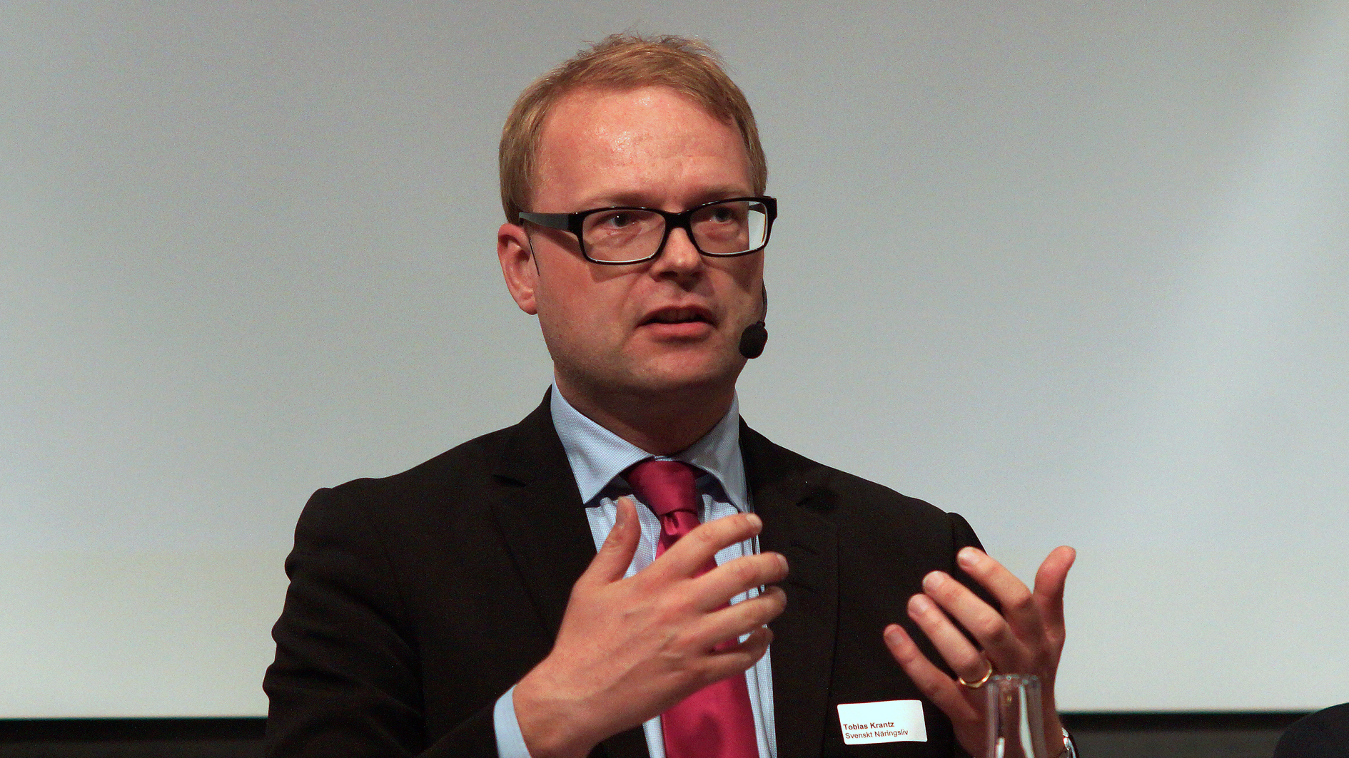 Tobias Krantz vid Innovation och forskning för tillväxt i Sverige, IT&Telekomföretagens årsmöte 2012.